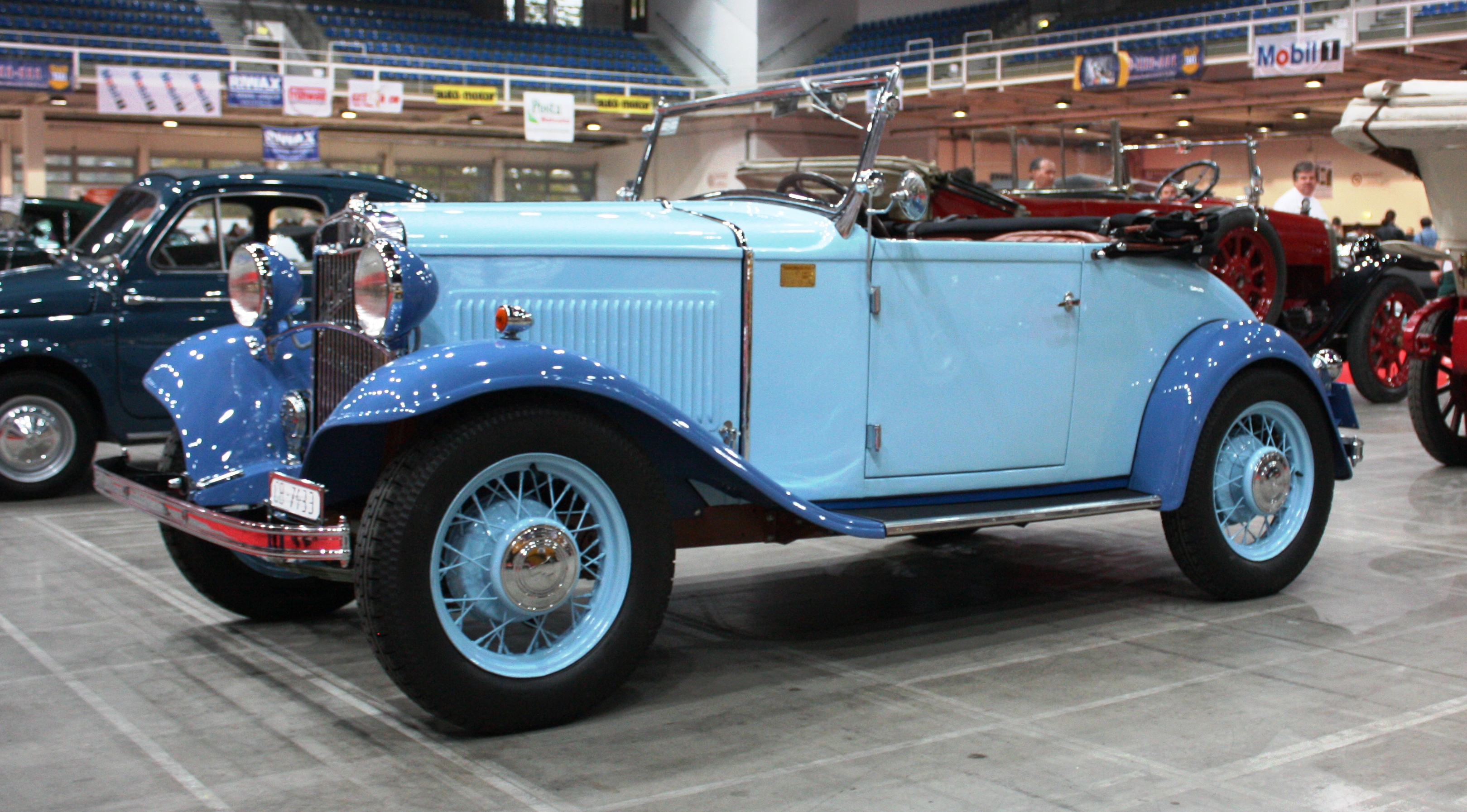 Opel 1.8 Liter series 1833 cabriolet Note that The “Regent” bodied Opel 1.8 litre cars had nothing in common with the ill fated Opel Regent of 1929 apart from the name.